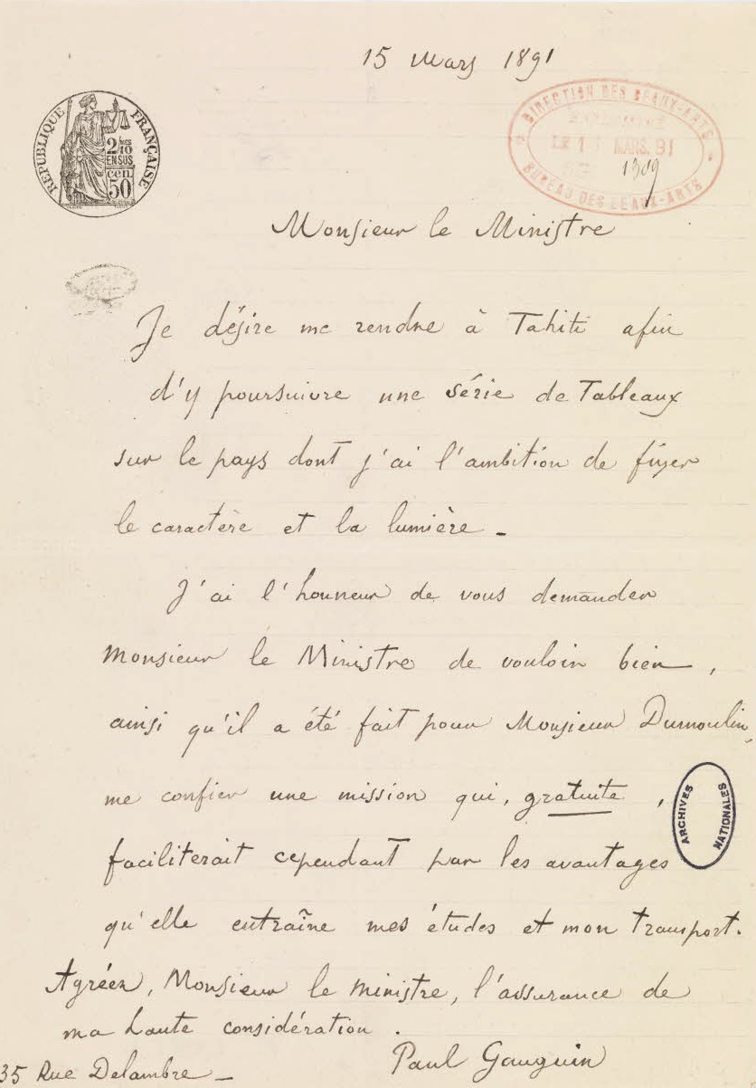 Lettre de candidature de Paul Gauguin auprès de la Direction des Beaux-arts en vue d’obtenir une mission artistique à Tahiti